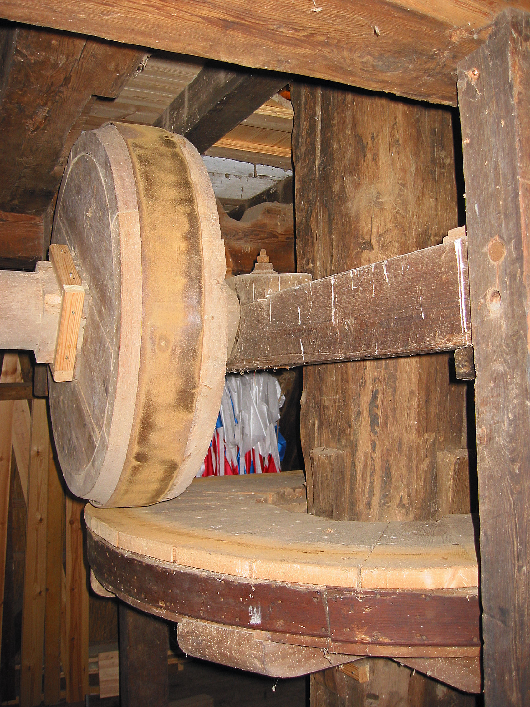 Molen De Hoop in Appel, luitafel, Gelderland, the Netherlands